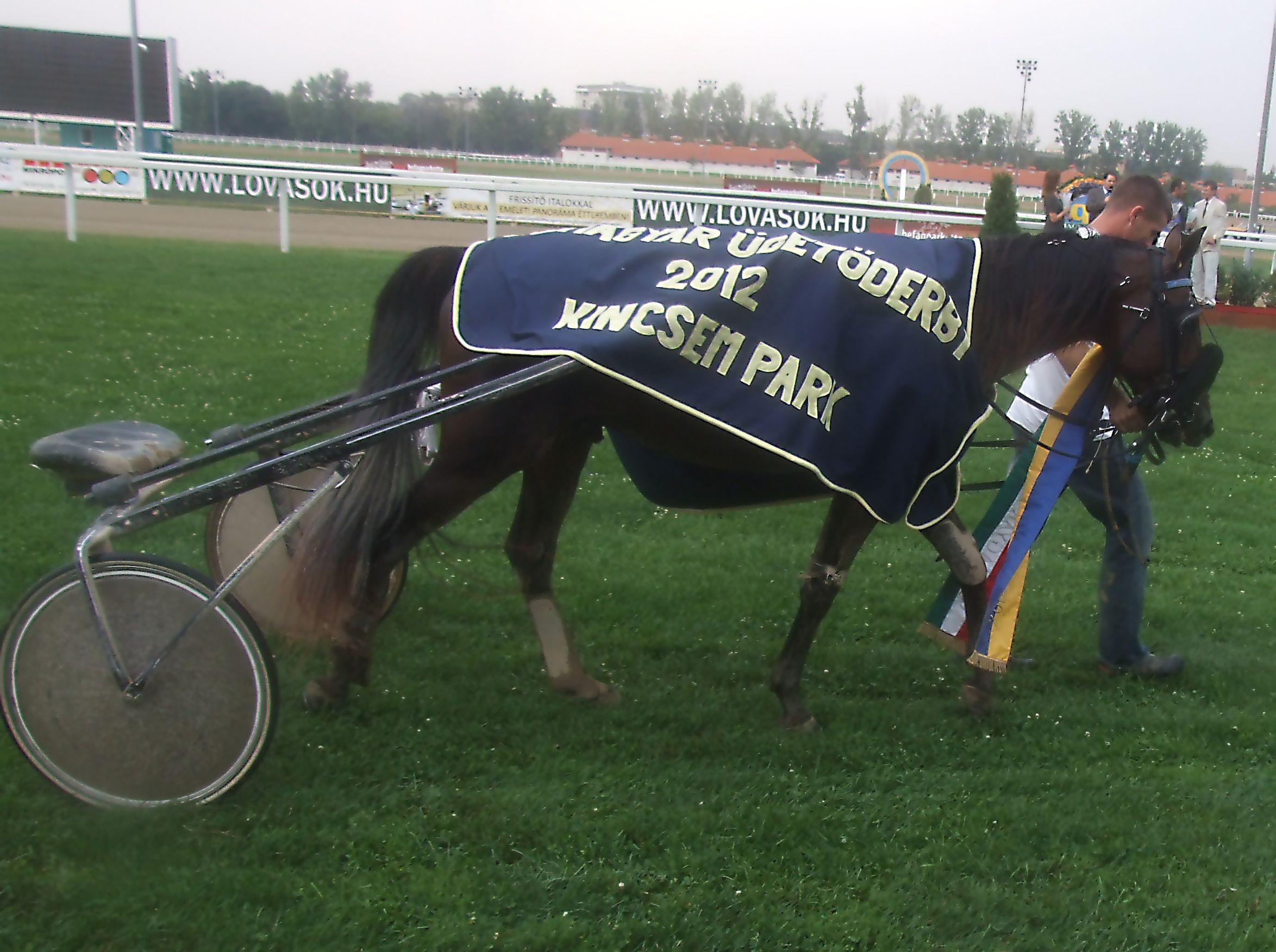 Magyar Ügetőderby 2012 a győztes Paperboy. Kincsem park.